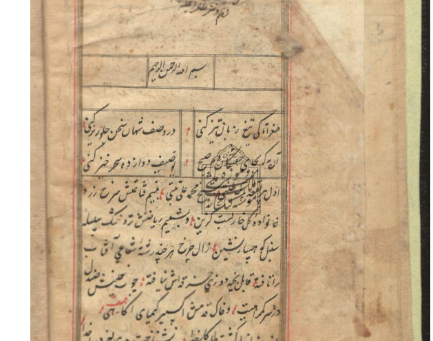 برگی از نسخهٔ خطی کلیات طغرا